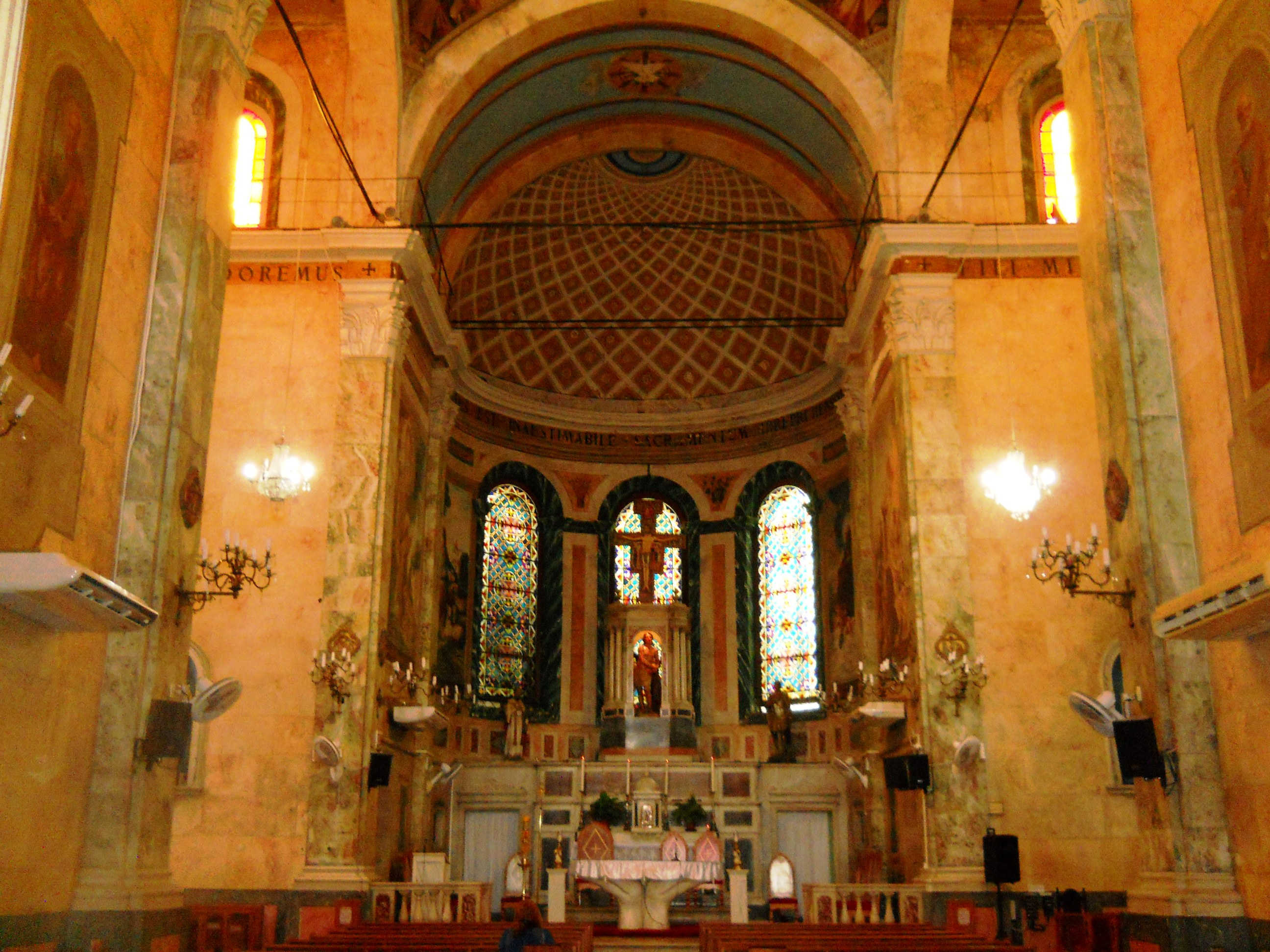 Centro Histórico de Manaus